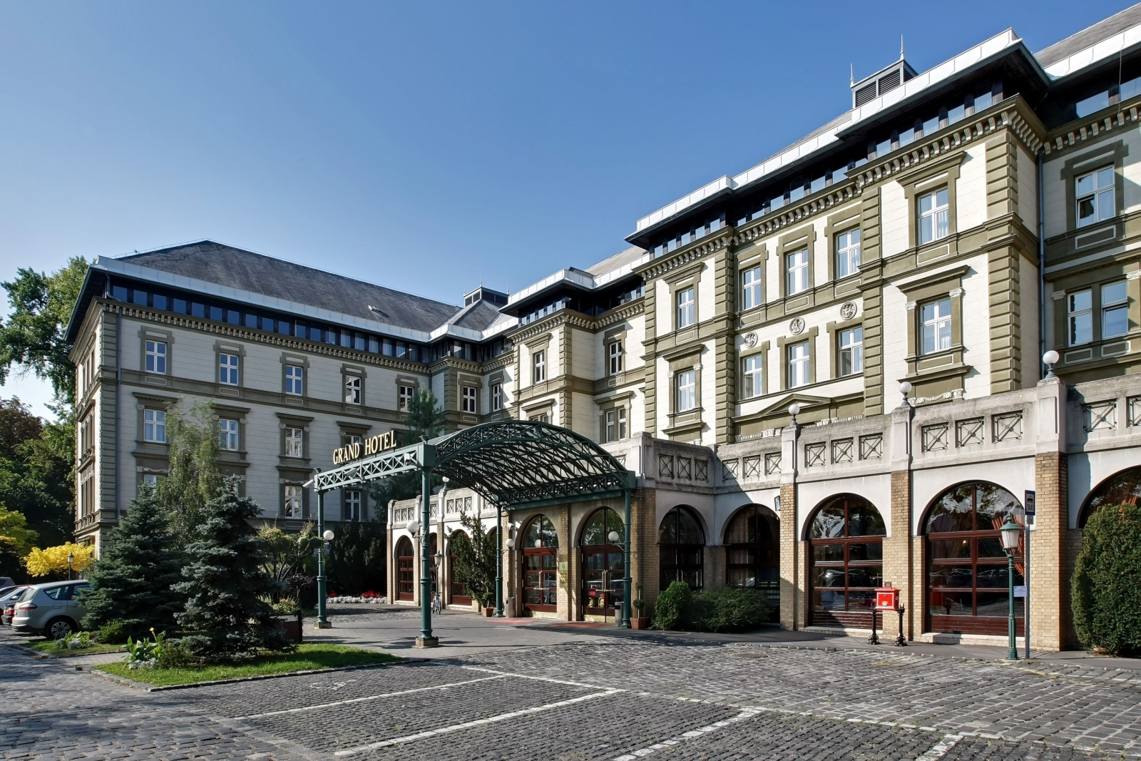 Danubius Grand Hotel Margitsziget főbejárata (Budapest)